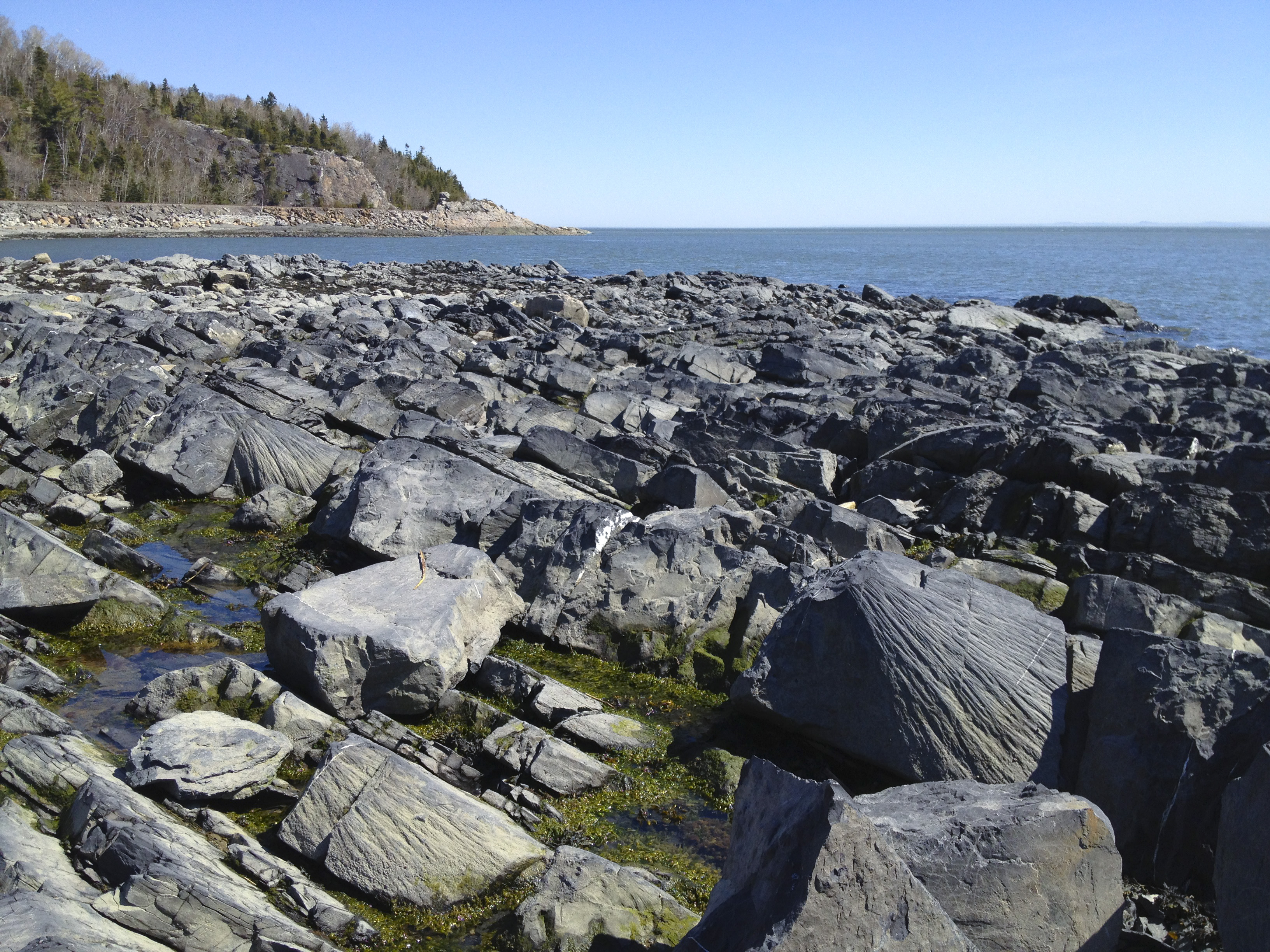 La grève de Cap-à-la-corneille, dans le secteur de Cap-aux-Oies, présente des cônes de percussion dans le calcaire ordovicien.